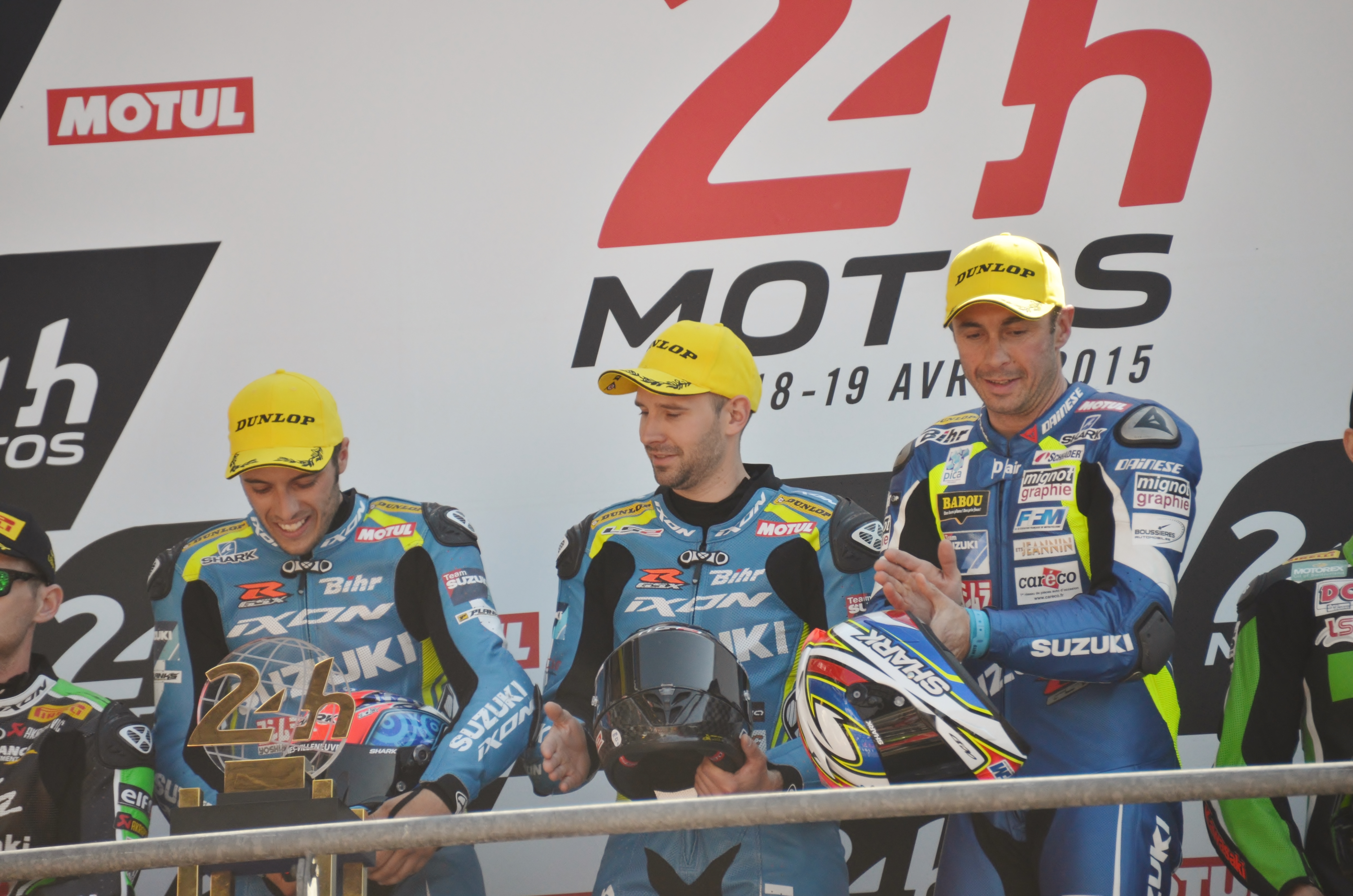 Etienne Masson lors des 24 Heures Moto 2015